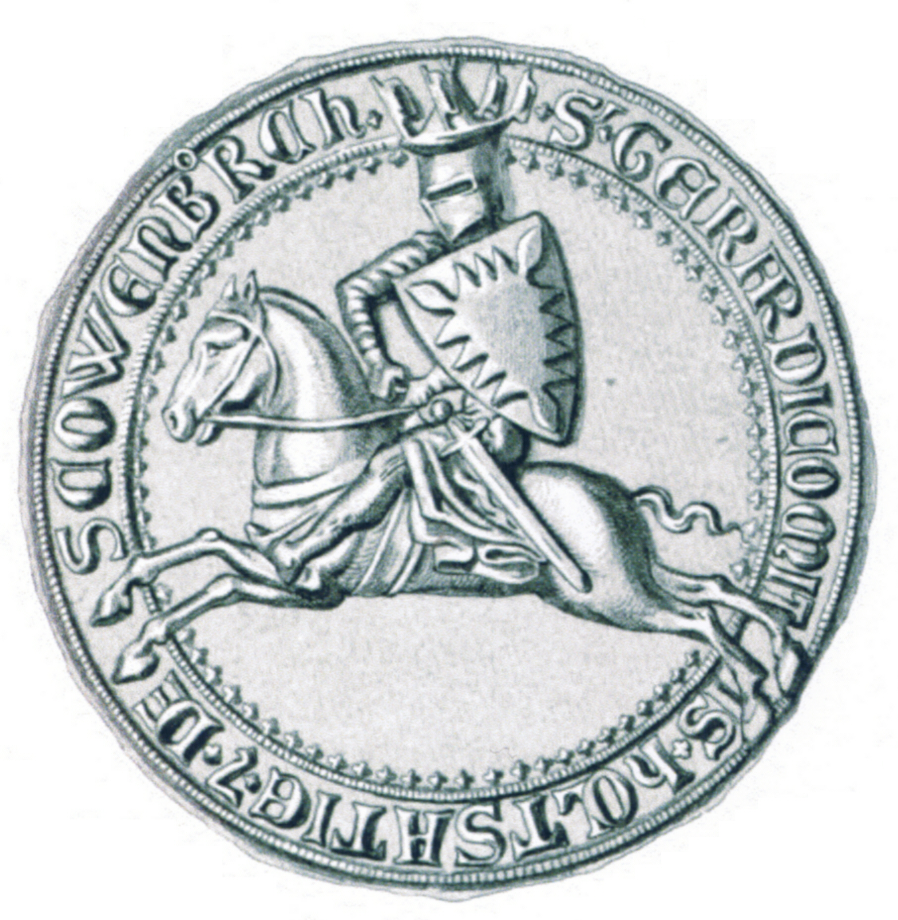 Siegel des Gerhard I. (Holstein-Itzehoe)